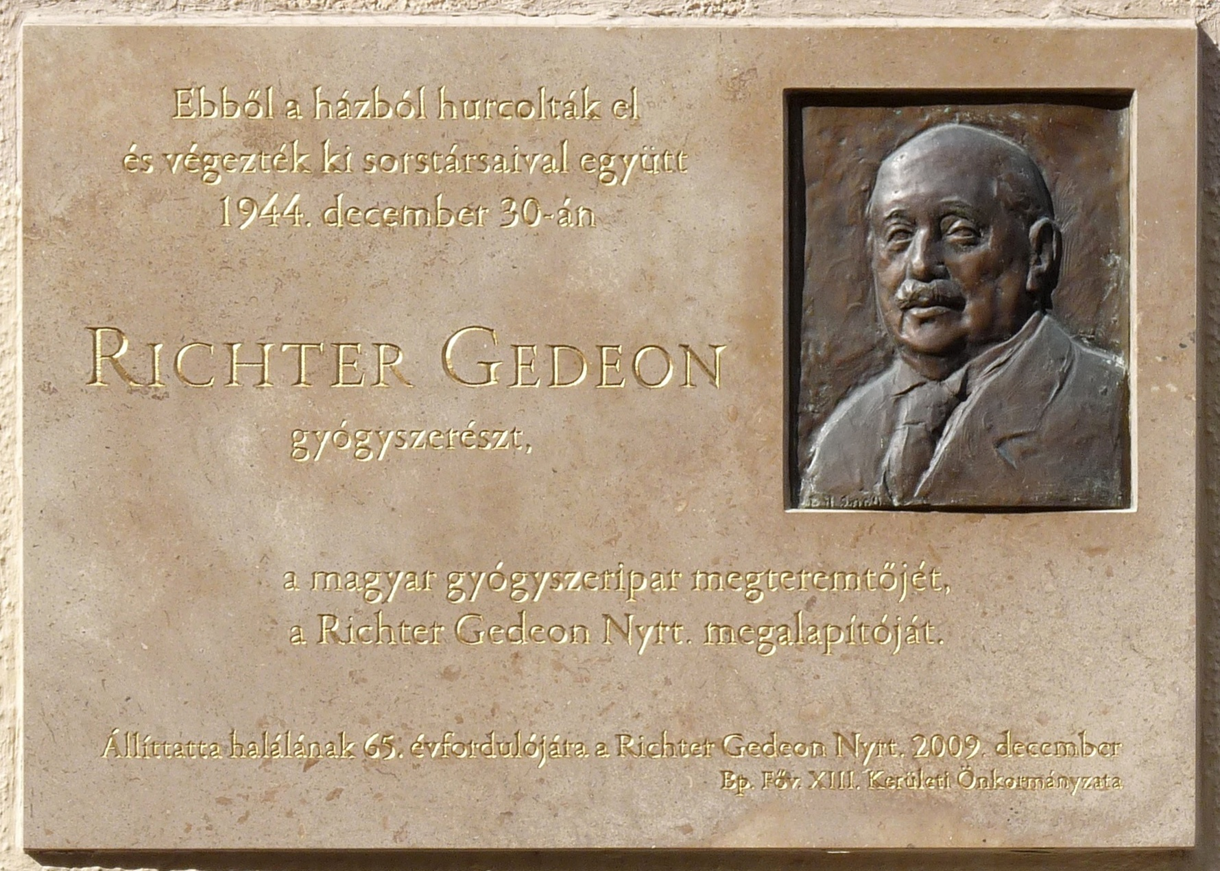 Richter Gedeon gyógyszerész, a modern hazai gyógyszeripar megteremtőjének emléktáblája, annak a háznak a falán, ahonnan 1944. december 30-án elhurcolták kivégezni. A bronz relief Buda István alkotása. Felavatva: 2009. december 7-én. Budapest, XIII. ker. Katona József utca 21.